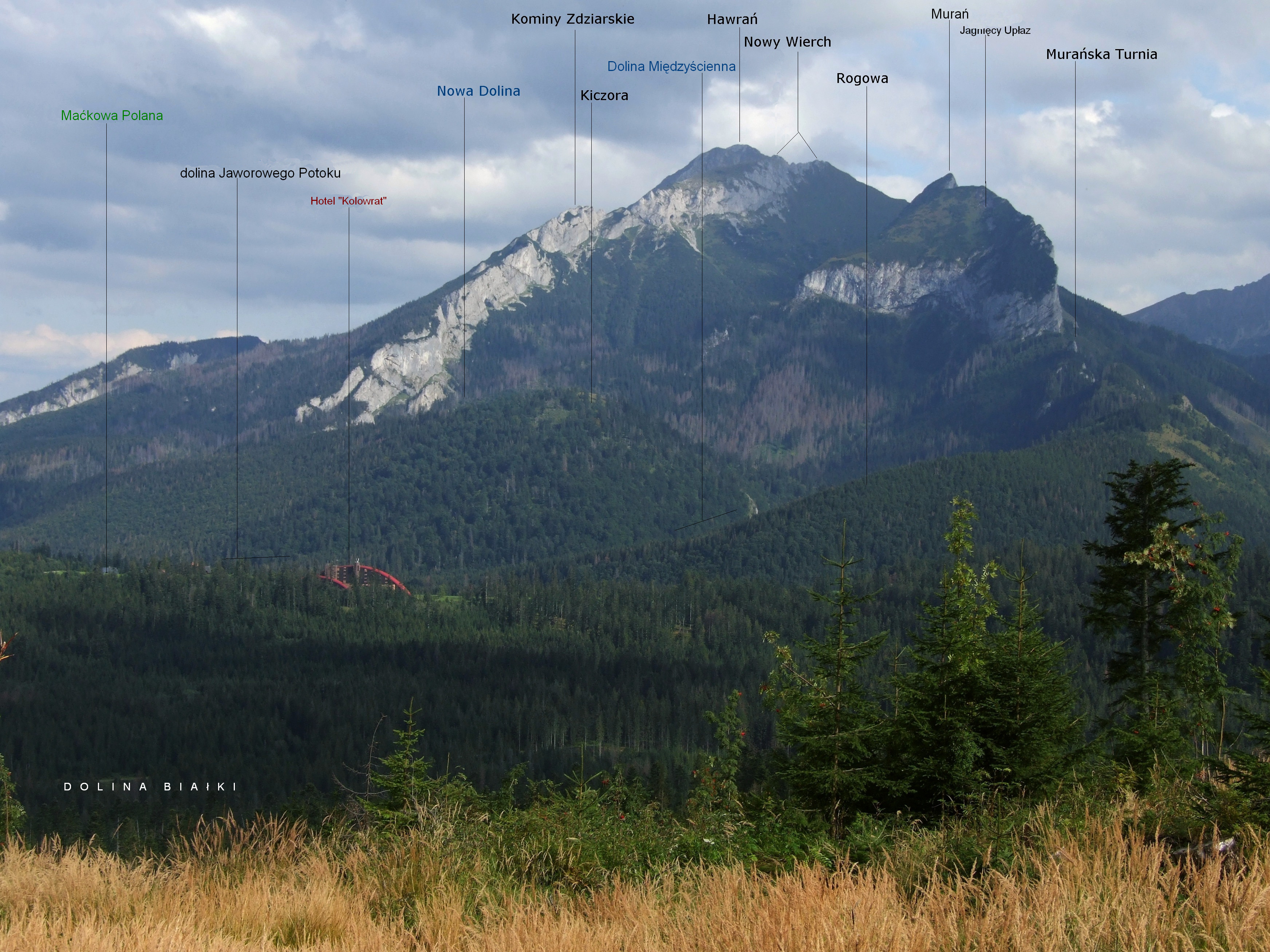 Tatry Bielskie i Pogórze Spiskie